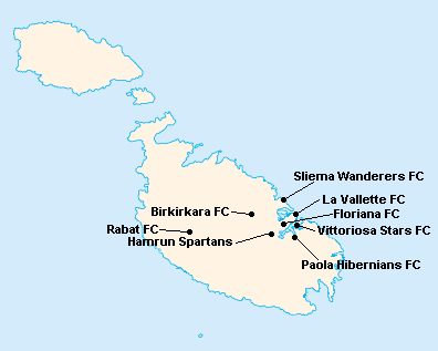 Répartition des clubs en First Division Maltaise 1955-1956.